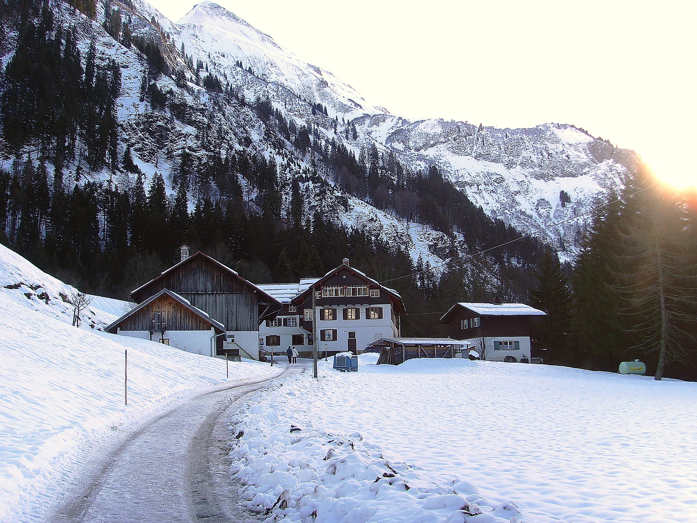 Der Weiler Einödsbach ist der südlichste ständig bewohnte Ort Deutschlands. Er liegt am Ende des Birgsautales auf 1113 m Höhe. Der Weiler besteht aus drei Häusern und einer Kapelle und gehört zur Gemeinde Oberstdorf. : The hamlet Einödsbach nearby Oberstdorf, Germany. It is the southermost permanend inhabited place in Germany Source: own work Date: Jan 06, 2007, Oberstdorf, Germany Author: Maschinenjunge Licence: GFDL, cc-by 3.0